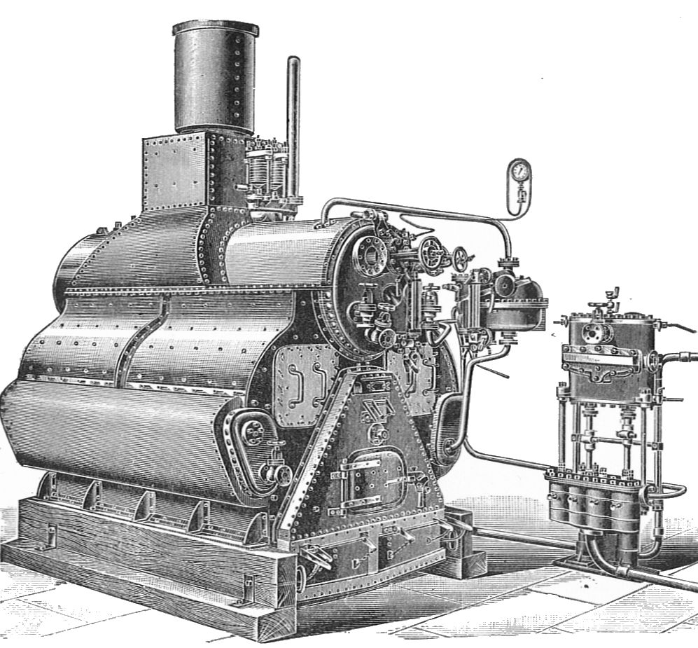 Mumford boiler (Rankin Kennedy, Modern Engines, Vol V).jpg